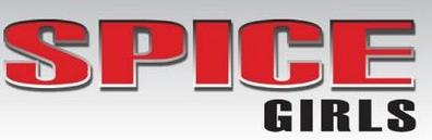 Logo